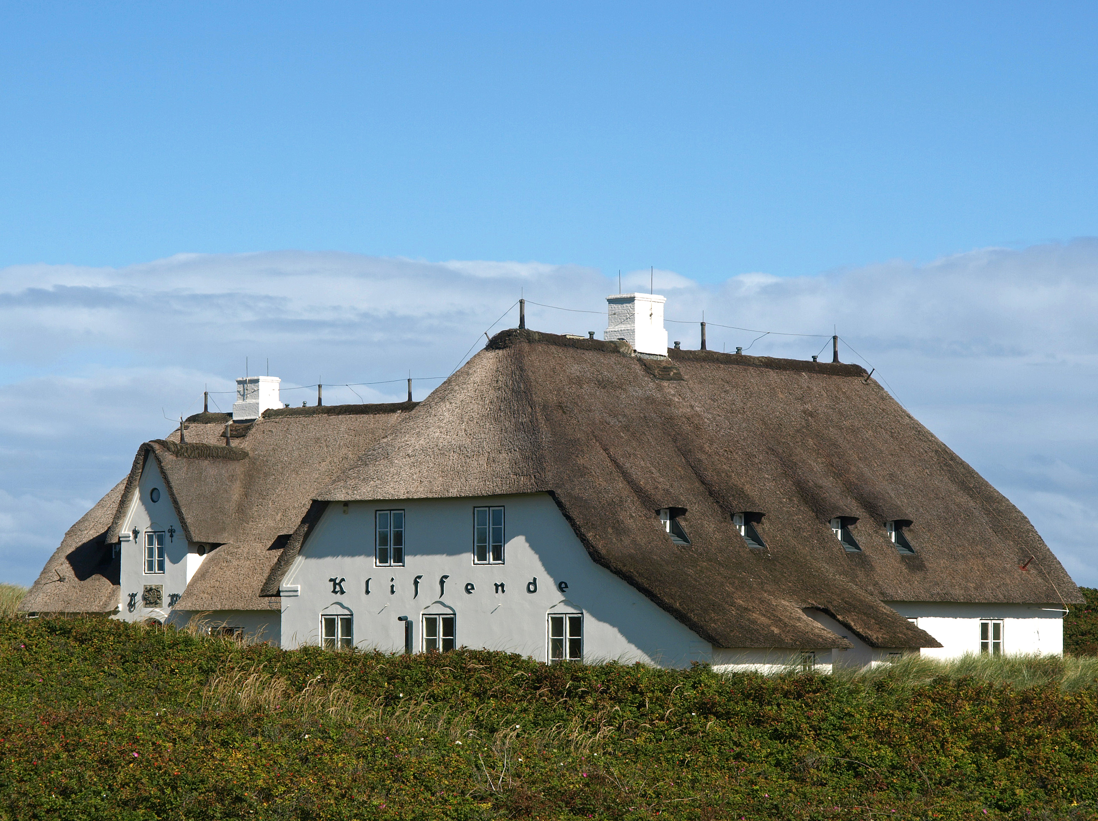 Haus Kliffende in Kampen